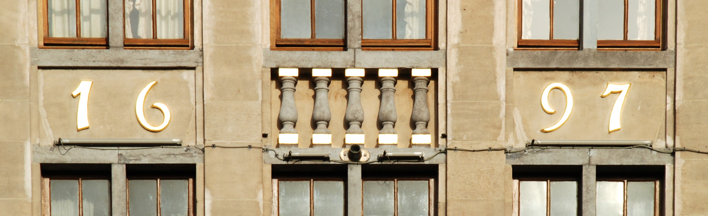 Belgique - Bruxelles - Grand-Place - Maison de l'Ange